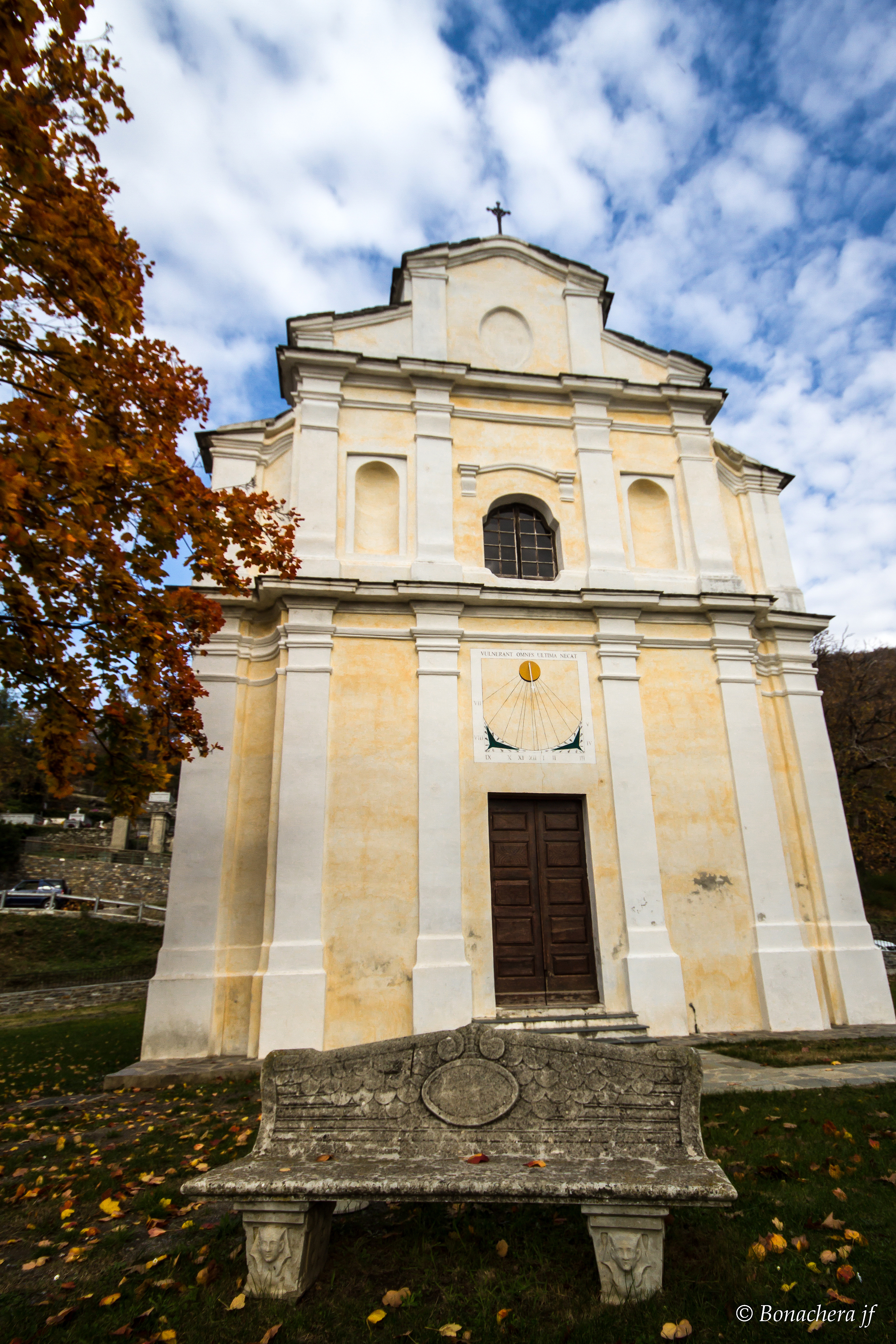 Felce, Castagniccia (Haute-Corse) - L'église paroissiale Saint-Côme-et-Saint-Damien, vue de face